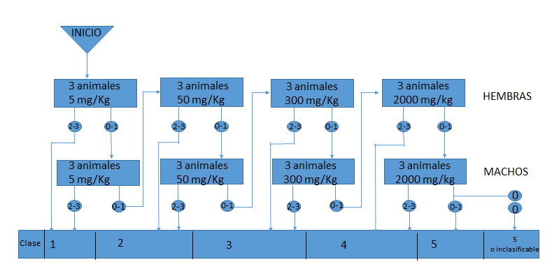 Ensayo de toxicidad aguda por vía oral por el método de la clase tóxica aguda, realizado con 3 animales por grupo y sexo, hasta una dosis límite de 2000 mg/kg